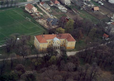 Palace- Bodajk, Hungary